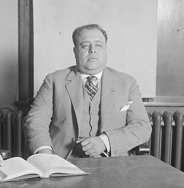 Luis Napoleón Morones. Político mexicano